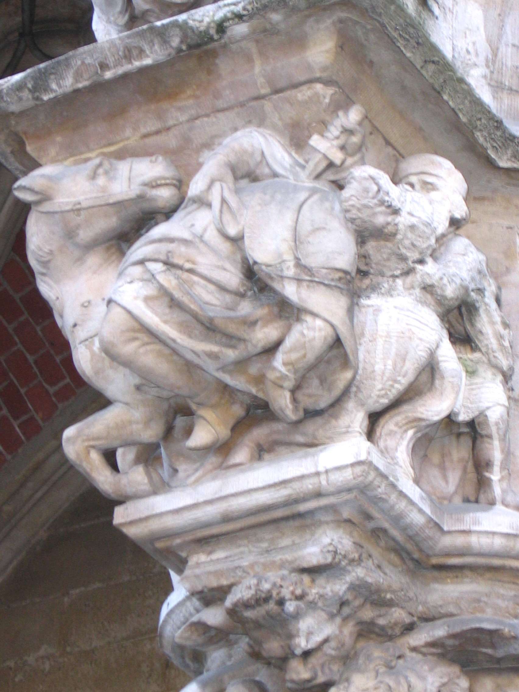 Brussels Town Hall. Hôtel de ville de Bruxelles: cul-de-lampe de l'aile gauche représentant l'assassinat d'Everard 't Serclaes